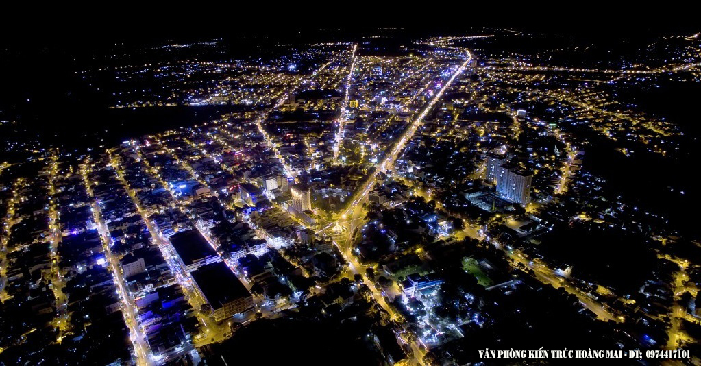 Không ảnh về đêm Buôn Ma Thuột